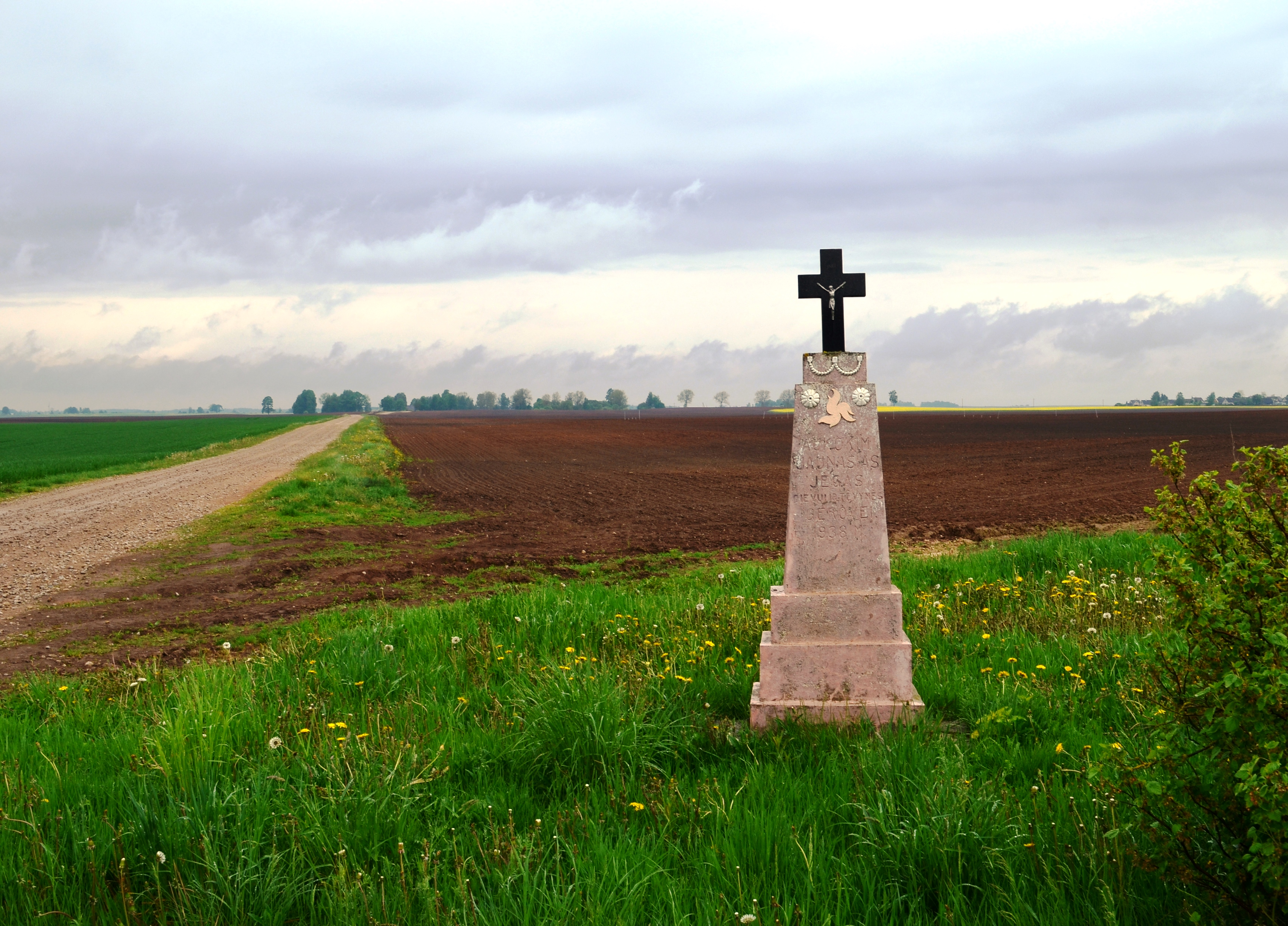 Paminklinis kryžius, Rugėnai, Kėdainių raj.